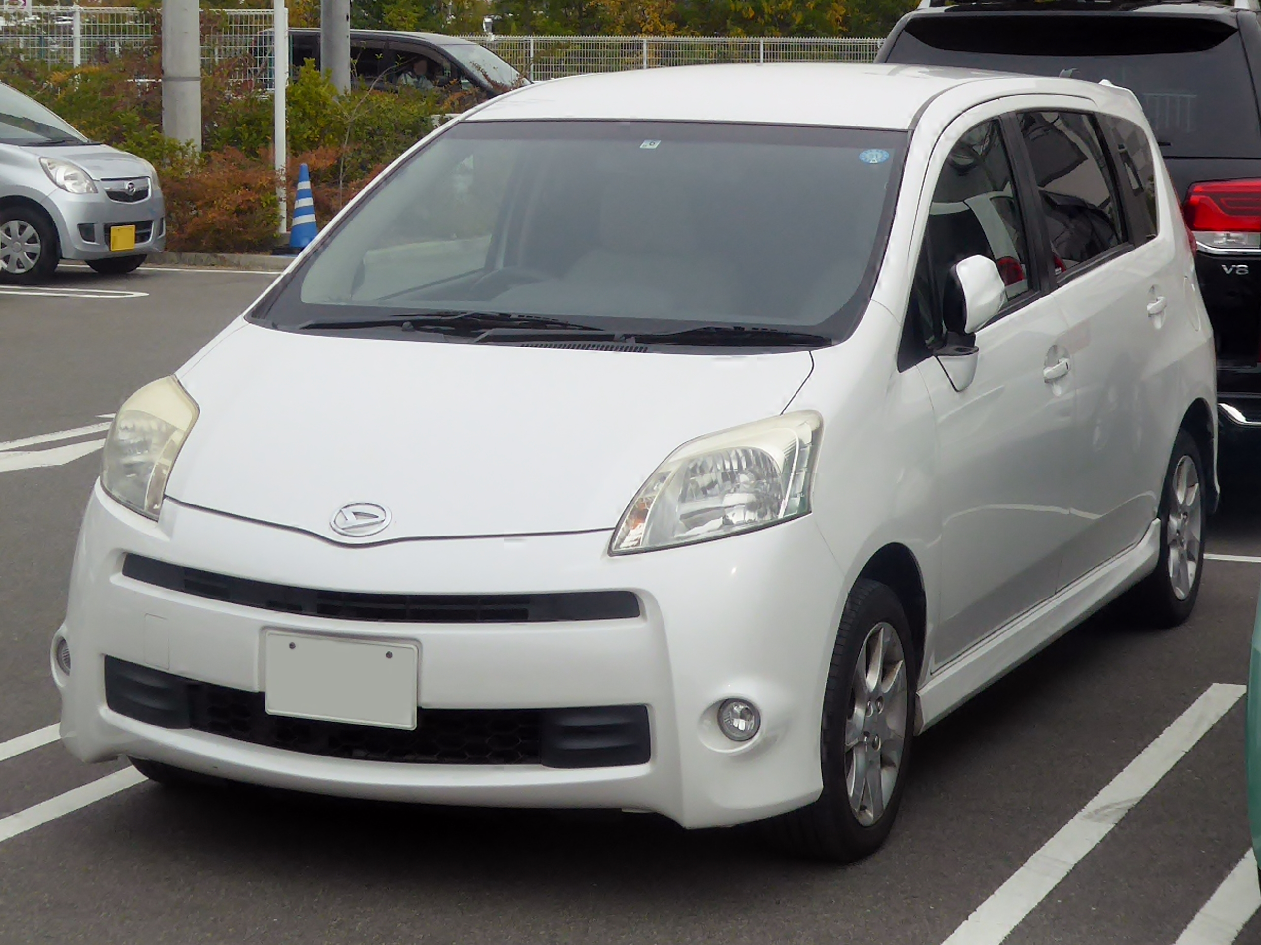 CBA-M502G型ダイハツ・ブーンルミナスCXエアロをフロントから撮影。